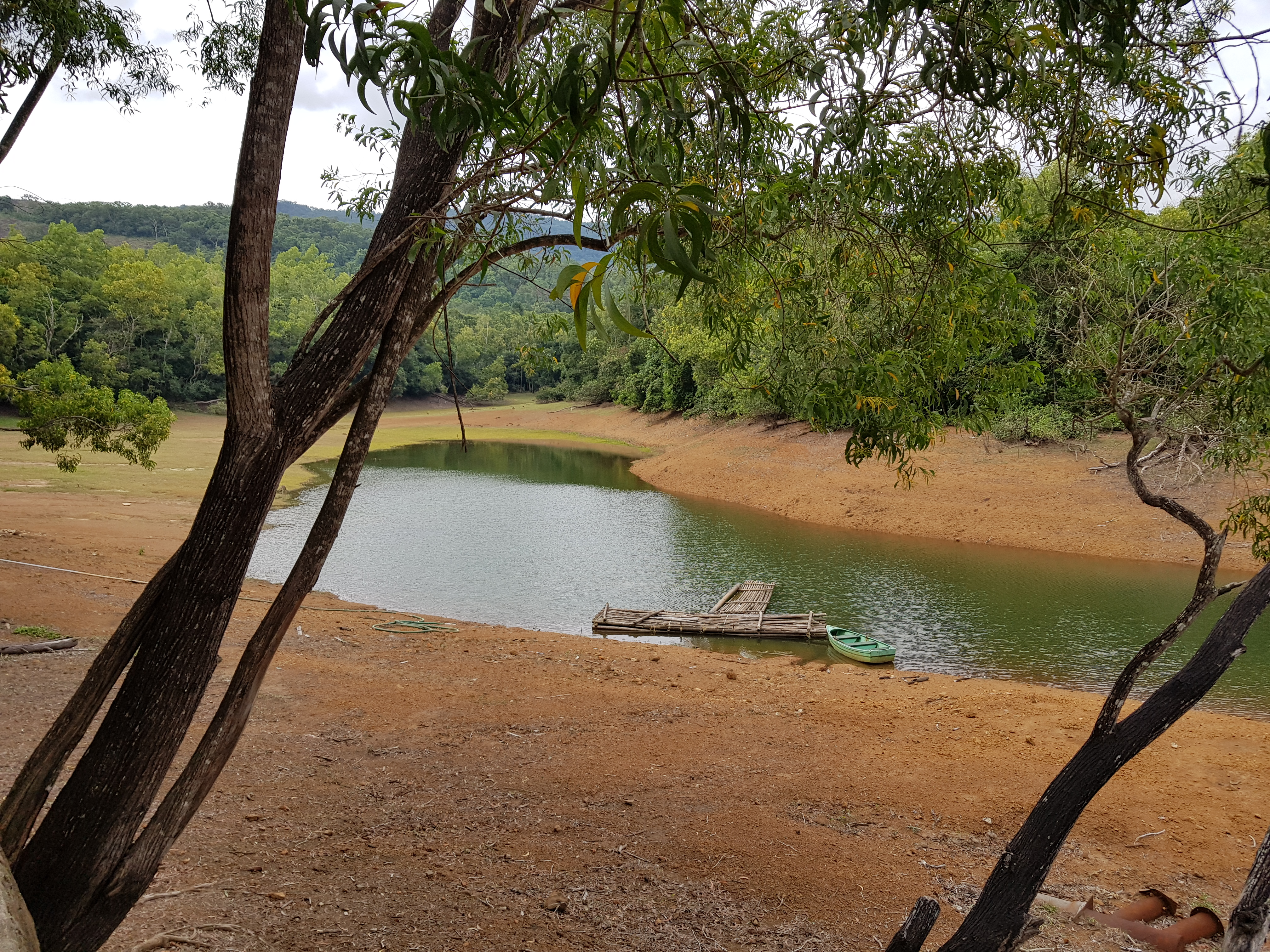 Kappukadu view